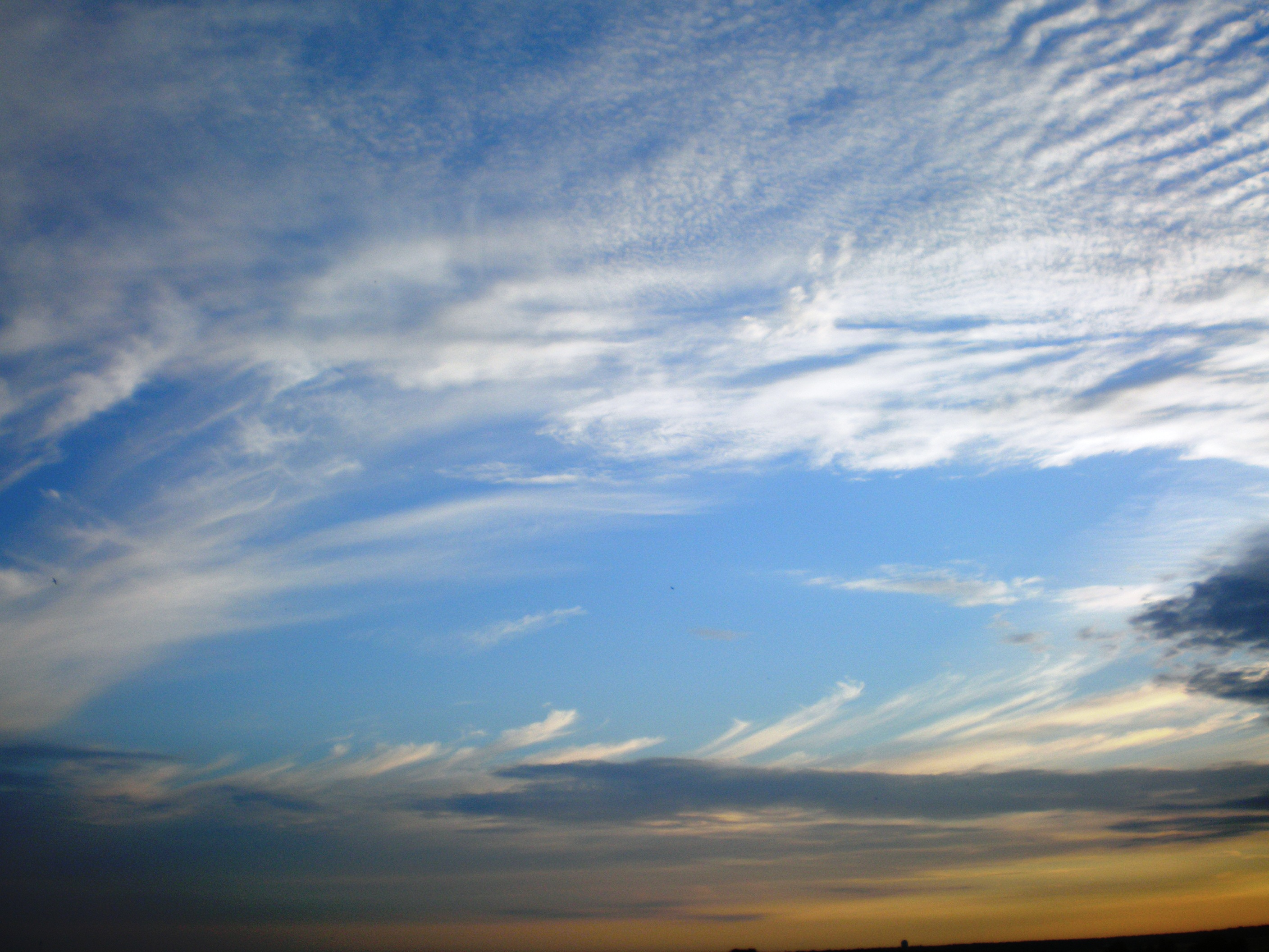 Sky above Lithuania